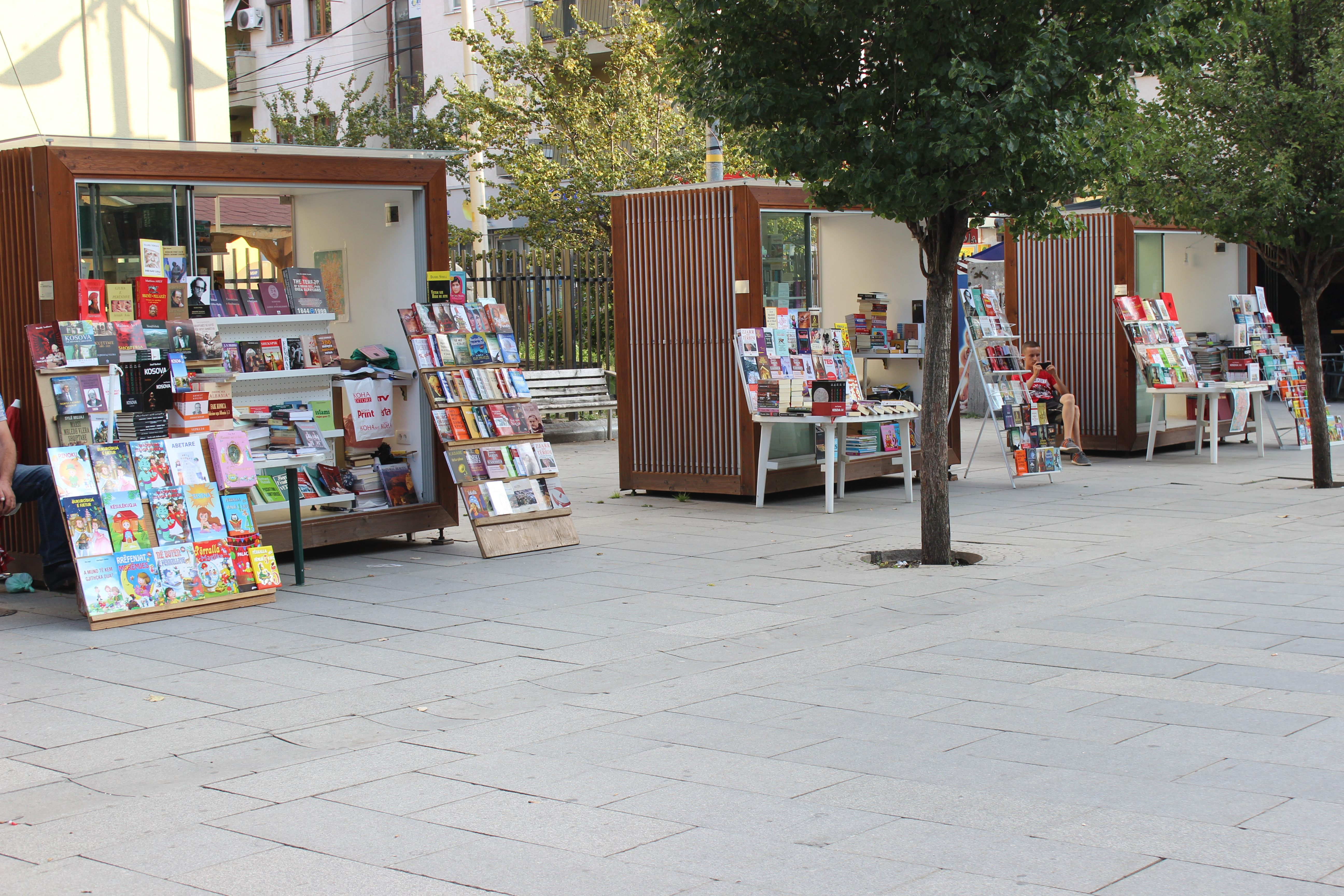 Kendi i librave, ne sheshin Nene Tereza, Prishtine.